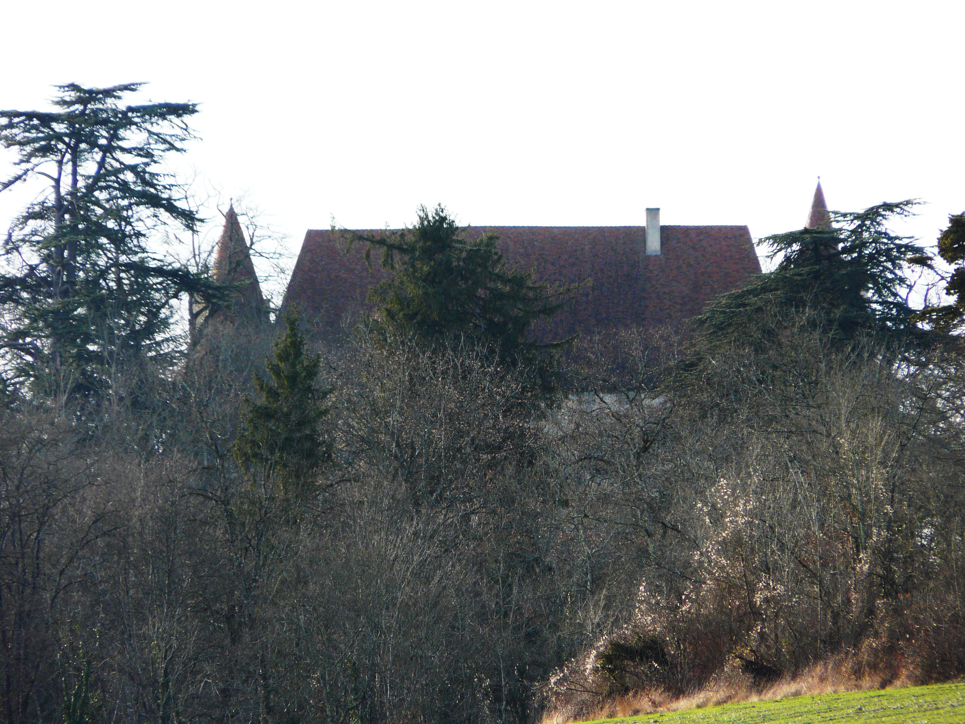 Les toits du château de Puyferrat, Saint-Astier, Dordogne, France. Object location45° 08′ 55.8″ N, 0° 30′ 23.7″ E .